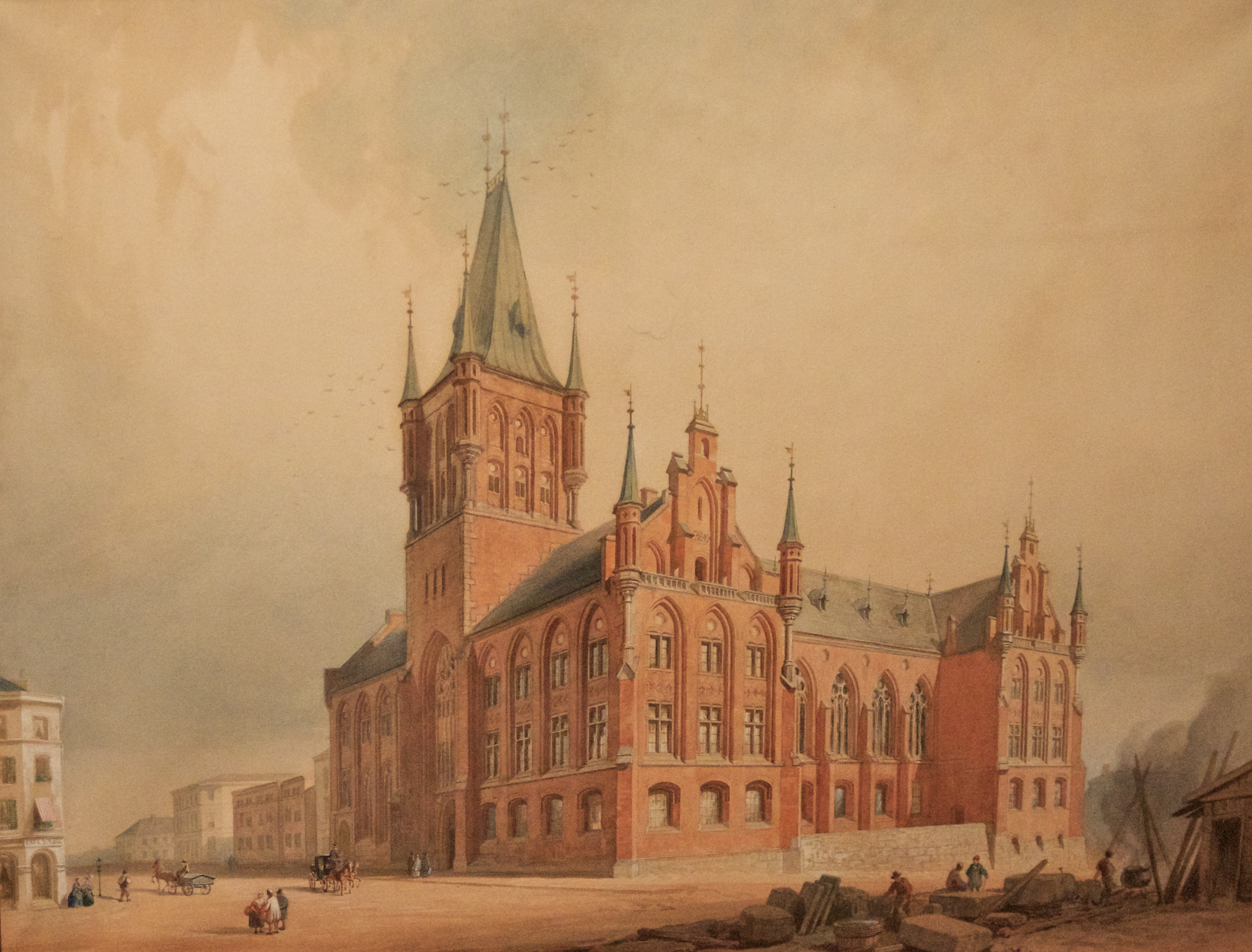 Wilhelm von Hanno og Heinrich E. Schirmers konkurranseutkast i konkurransen om en ny stortingsbygning. Maleri av von Hanno, ca. 1857. Fra samlingene til Nasjonalmuseet – Arkitektur.